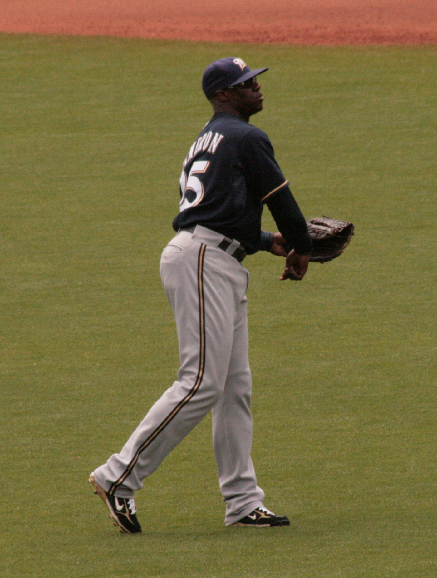 Mike Cameron